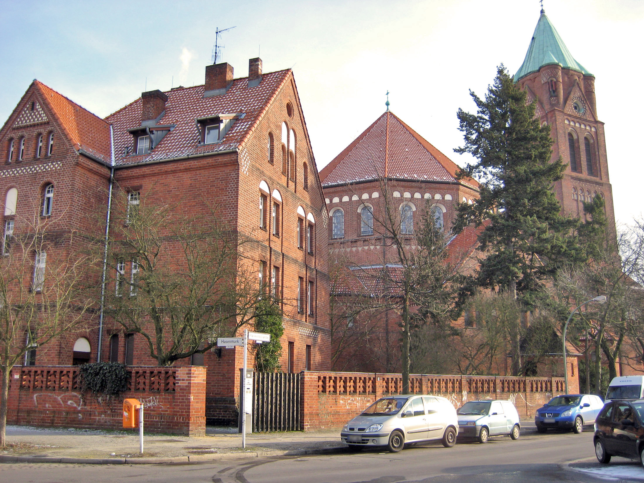 Spandau Hasenmark - Kirche St. Maria, Hilfe der Christen